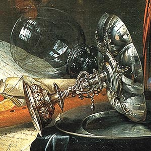 detail: cup